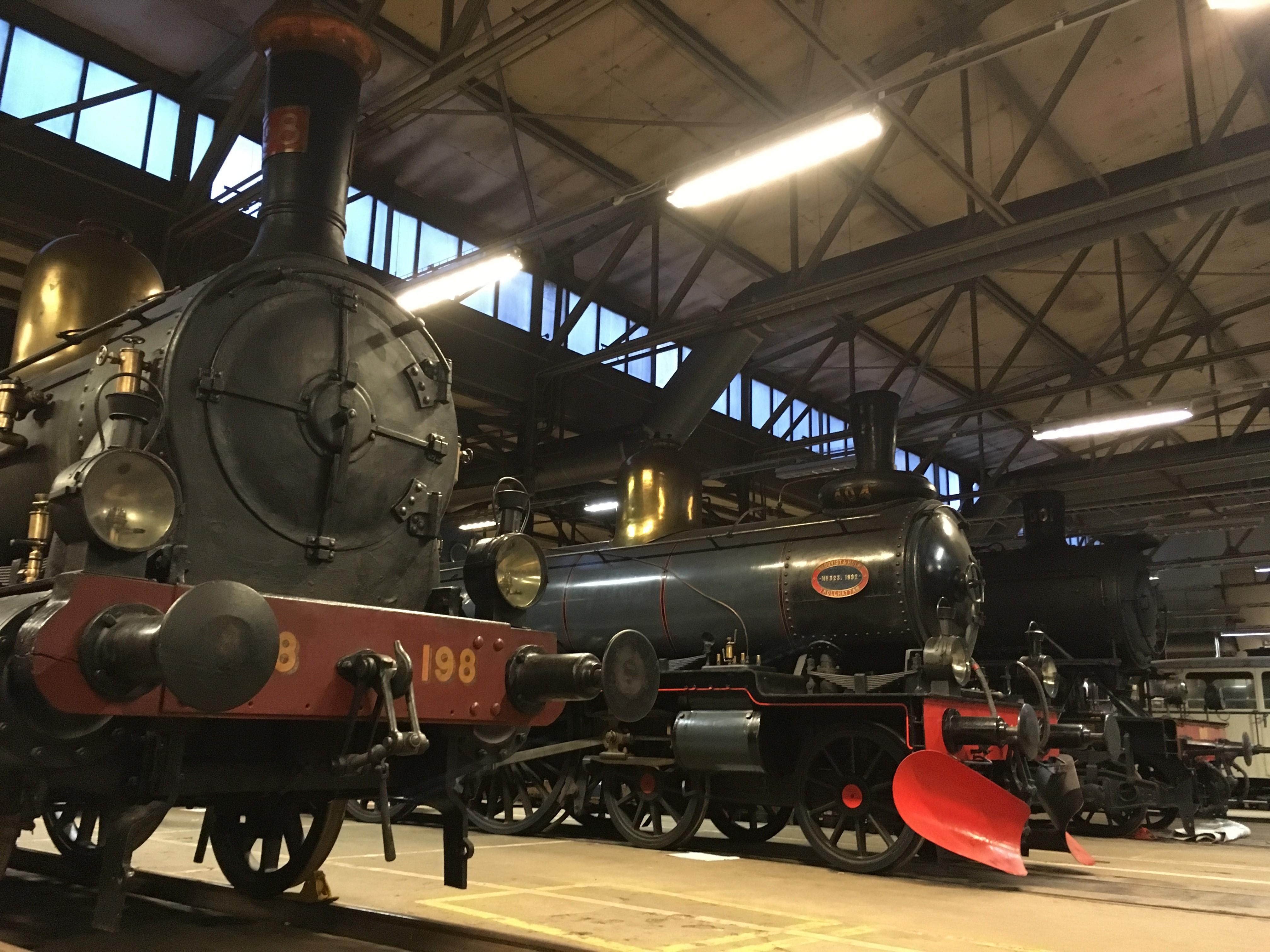 Delar av samlingen som visas på Tåghallen vid öppethållandet 2018